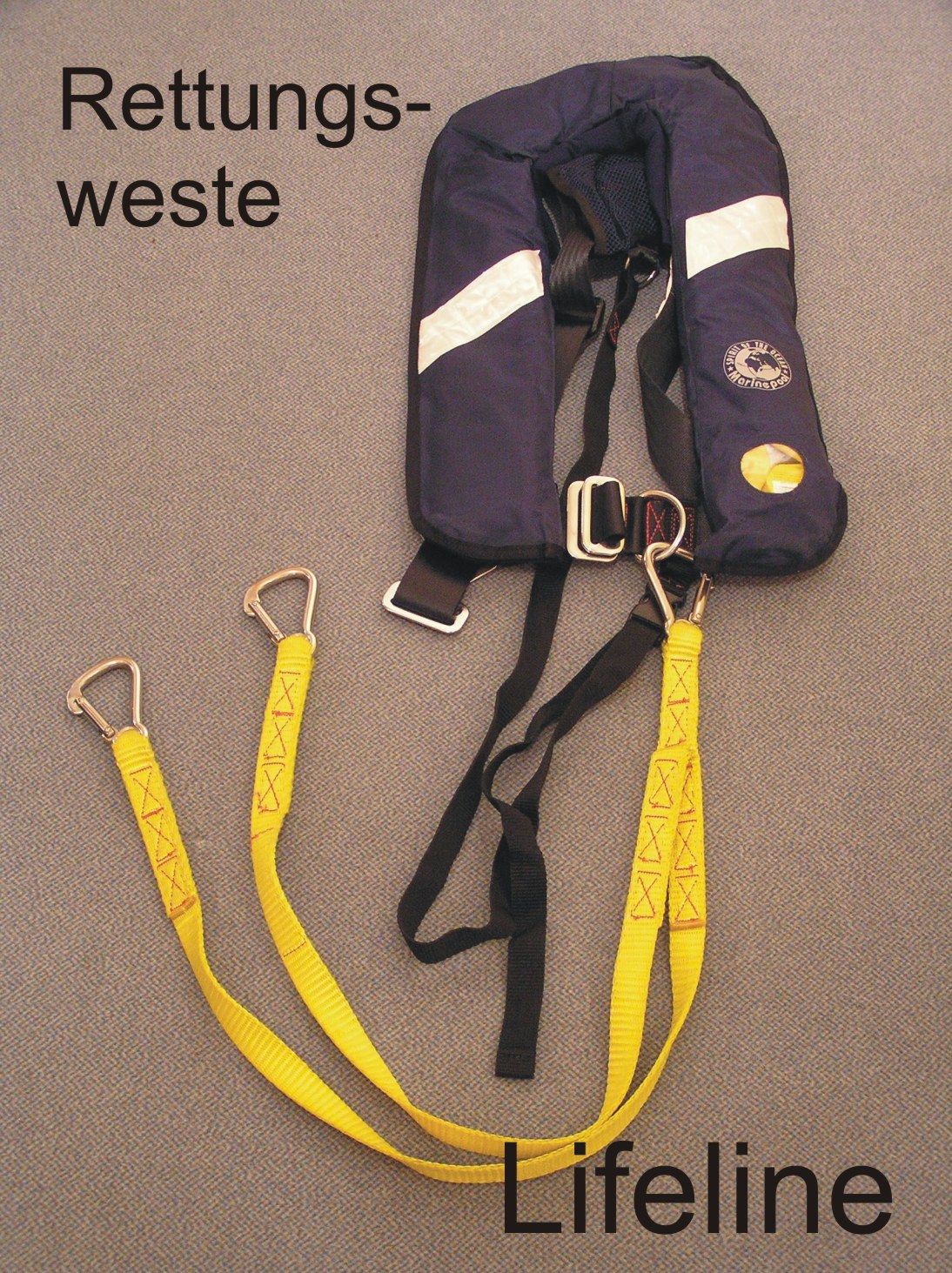 Rettungsweste mit Lifeline